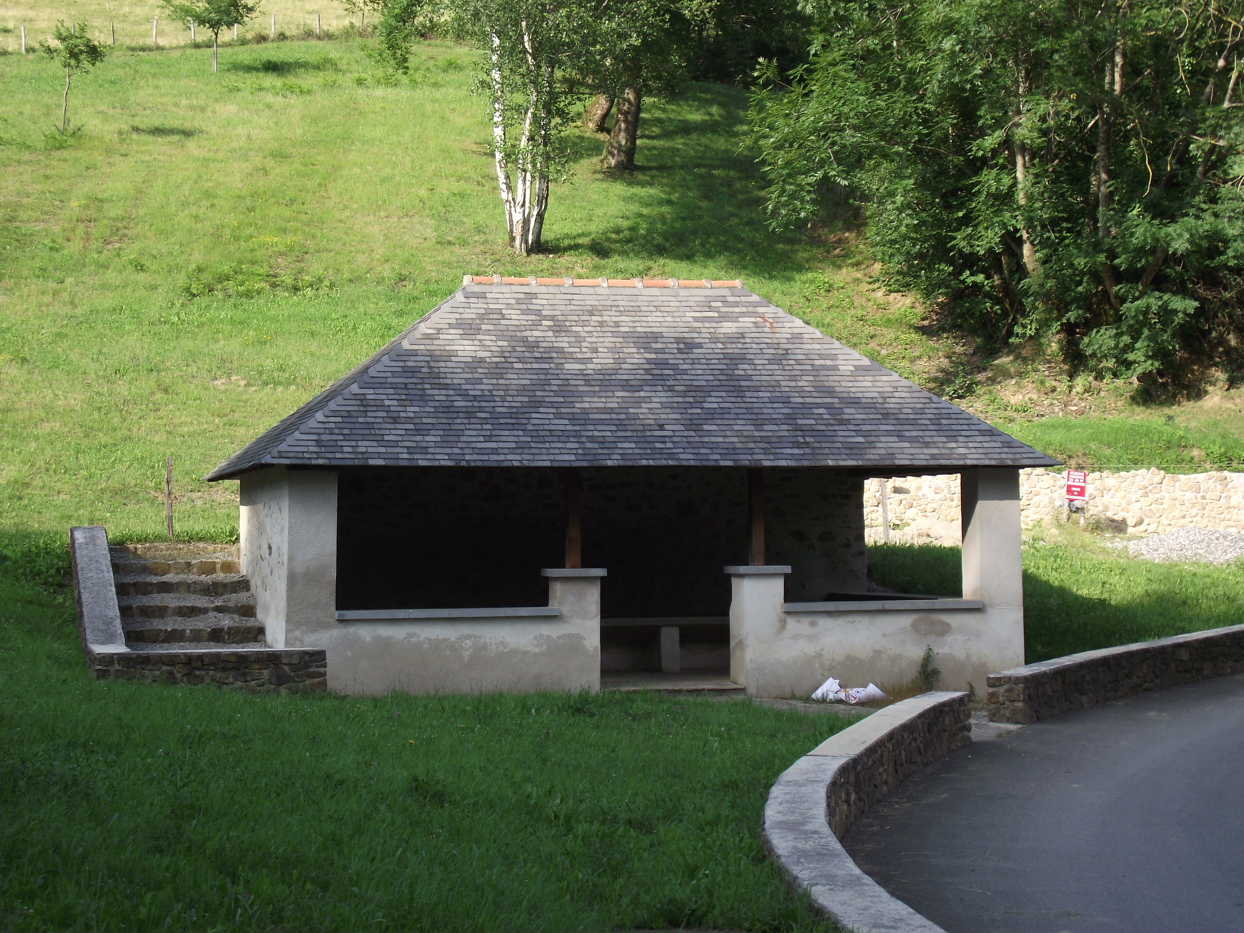 Lavoir de Julos (Hautes-Pyrénées, France)